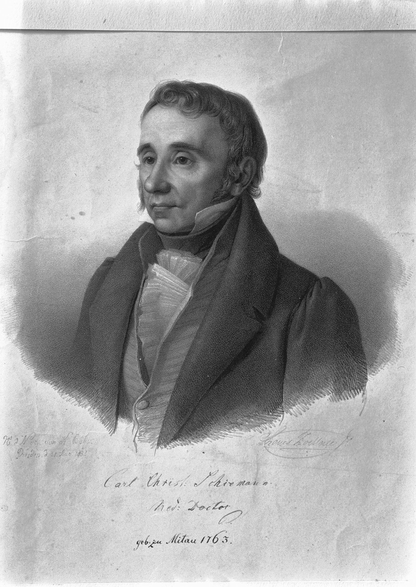 Bildnis des deutschbaltischen Arztes Carl Christian Schiemann (1763-1835) in Mitau von Johann Karl Ulrich Bähr (1833).